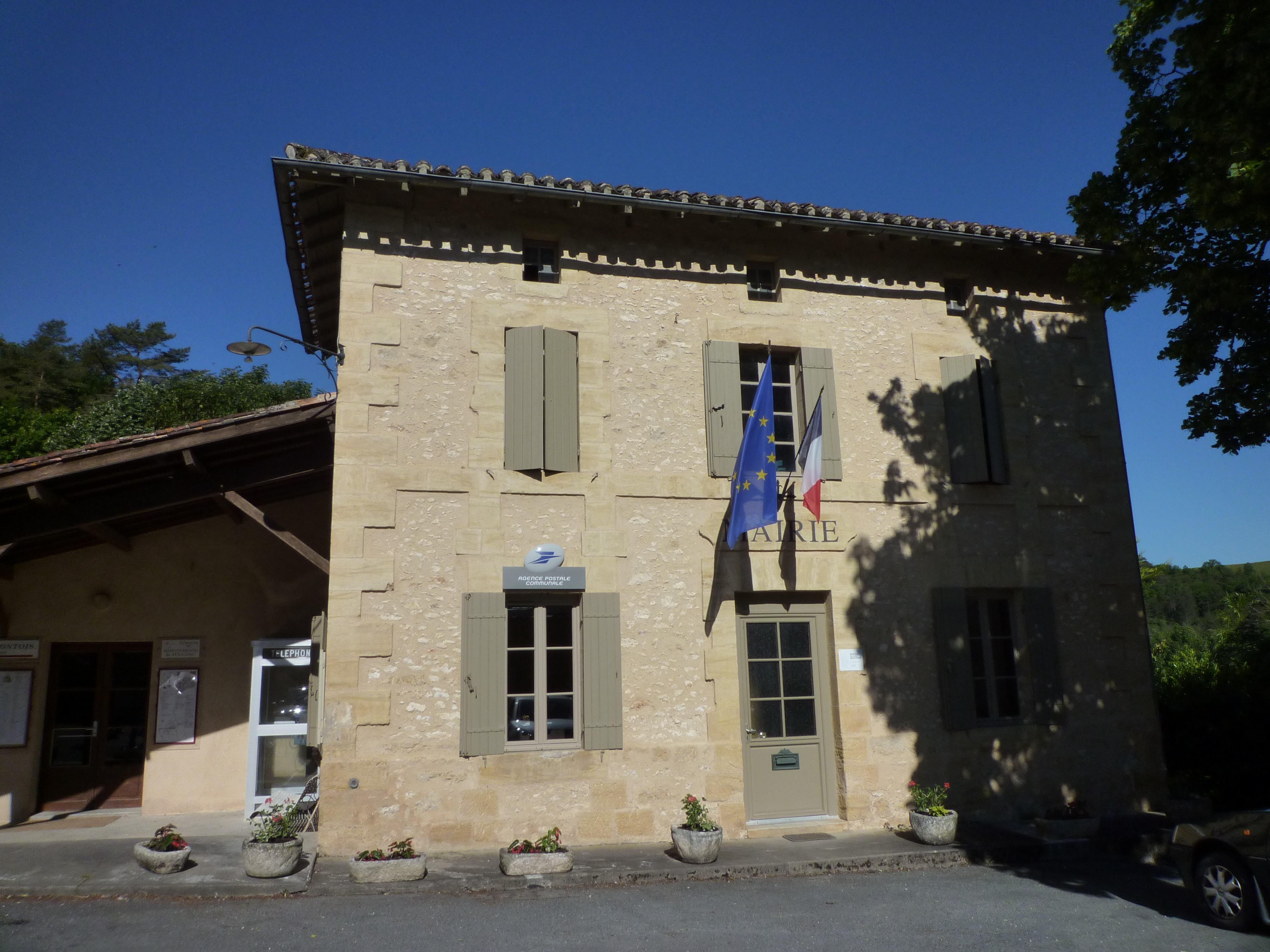 La mairie